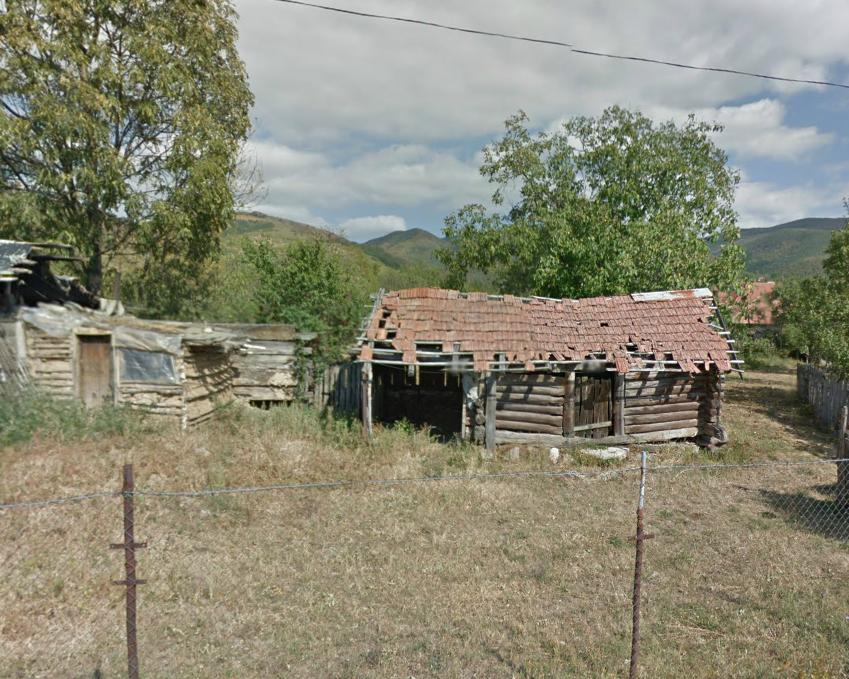 Casa de lemn Dumitru Danciu